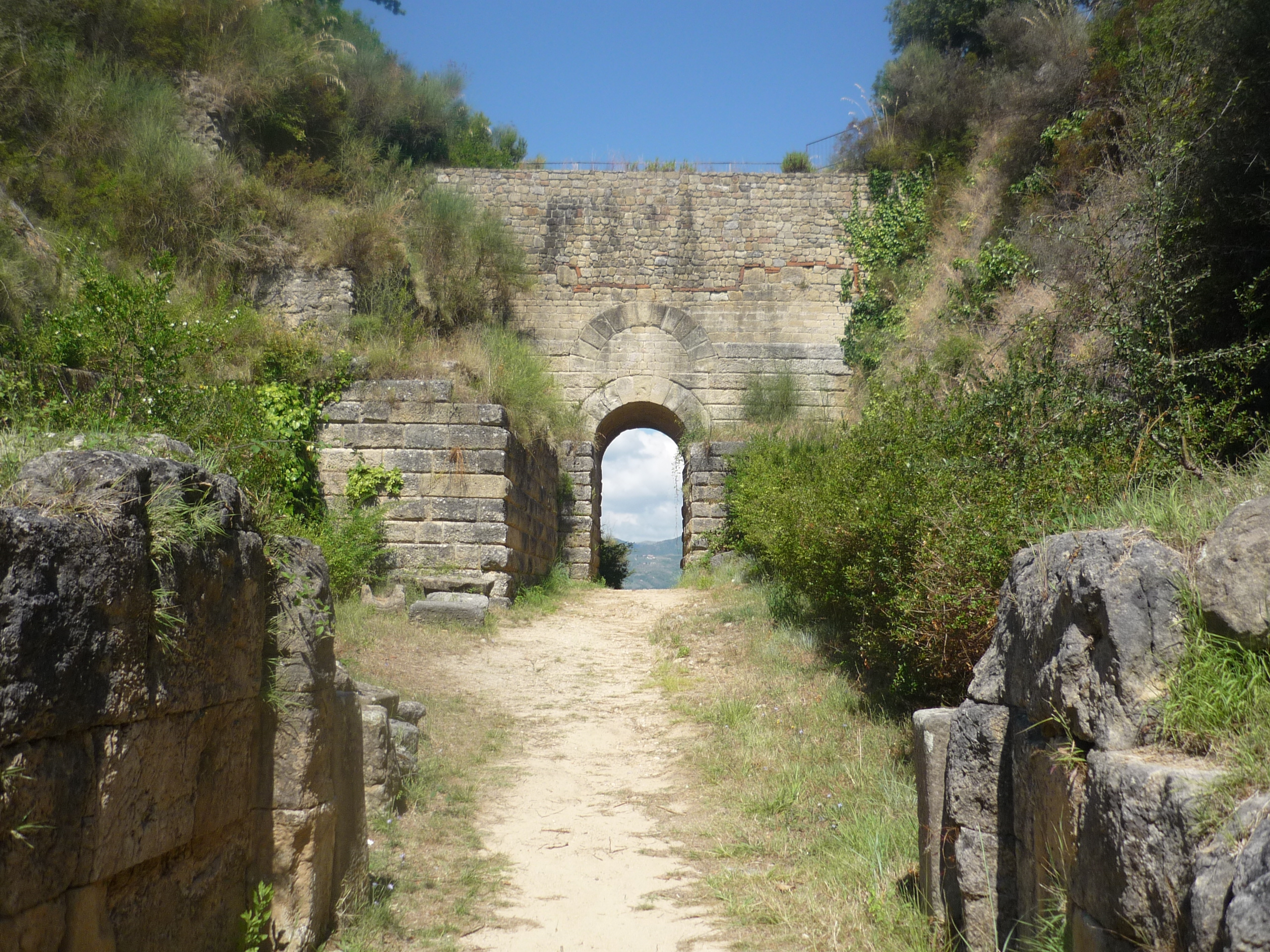 Parco archeologico di Velia - Porta Rosa - Vista dall'interno delle mura This is a photo of a monument which is part of cultural heritage of Italy.